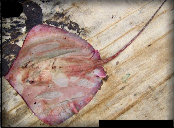 Хвостокол-гимантура Himantura randalli